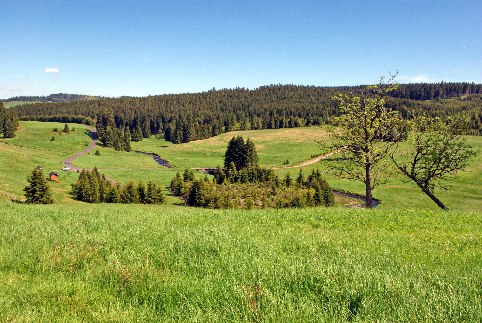 říčka Černá v místě zaniklé obce Háje (Zwittermühl), Krušné hory, okres Karlovy Vary